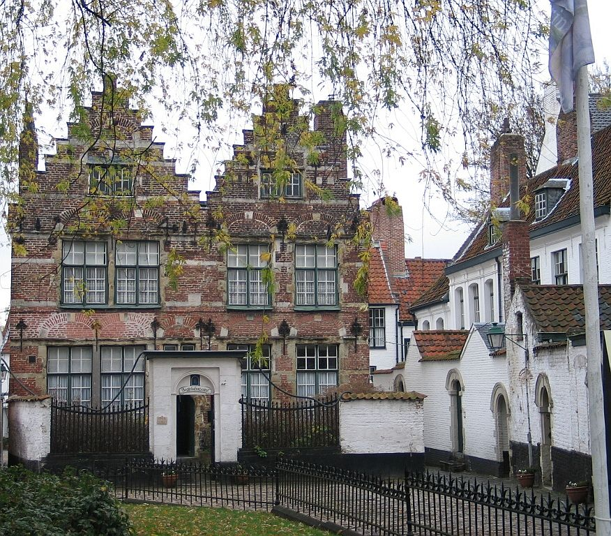 23 nov 2004 - eigen foto Saint Elisabeth Beguinage of Kortrijk (Belgium): former house of the mother superior, now the Beguinage museum Begijnhof Sint-Elisabeth van Kortrijk (België) : vroeger huis van de Grootjuffrouw, nu Begijnhofmuseum Béguinage Sainte-Elisabeth de Courtrai, (Belgique), ancienne maison de la supérieure, actuellement musée du Béguinage